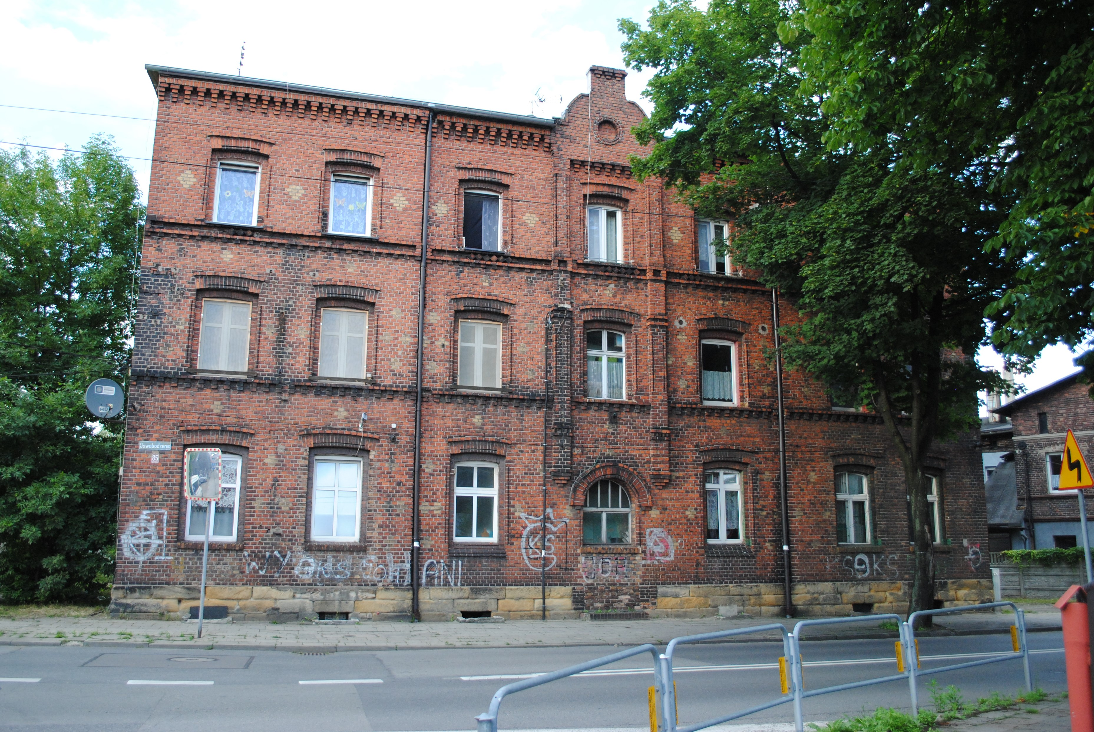 Katowice - Janów-Nikiszowiec Ul. Oswobodzenia